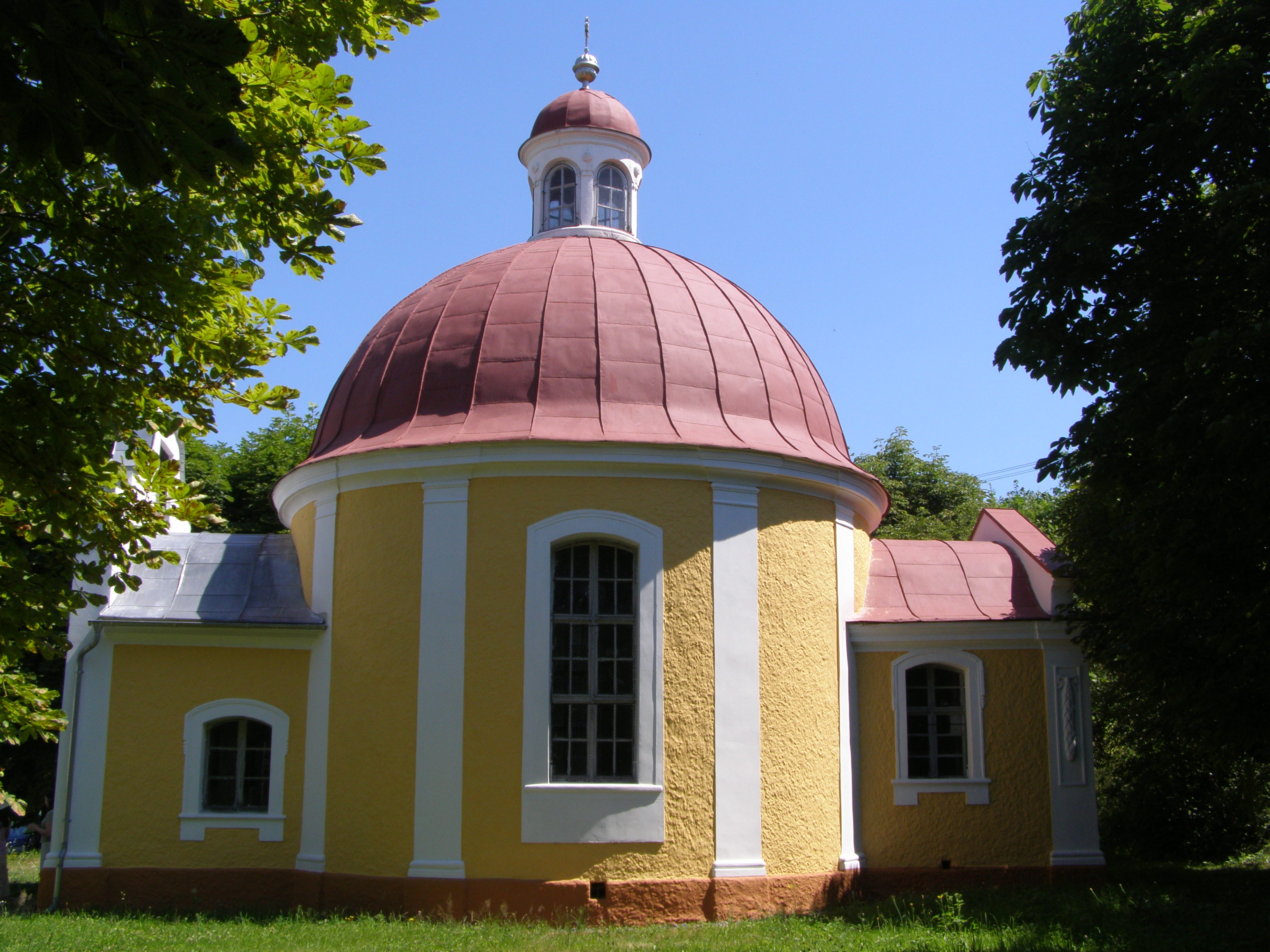 Černousy, kaple sv. Jana Nepomuckého, západní část